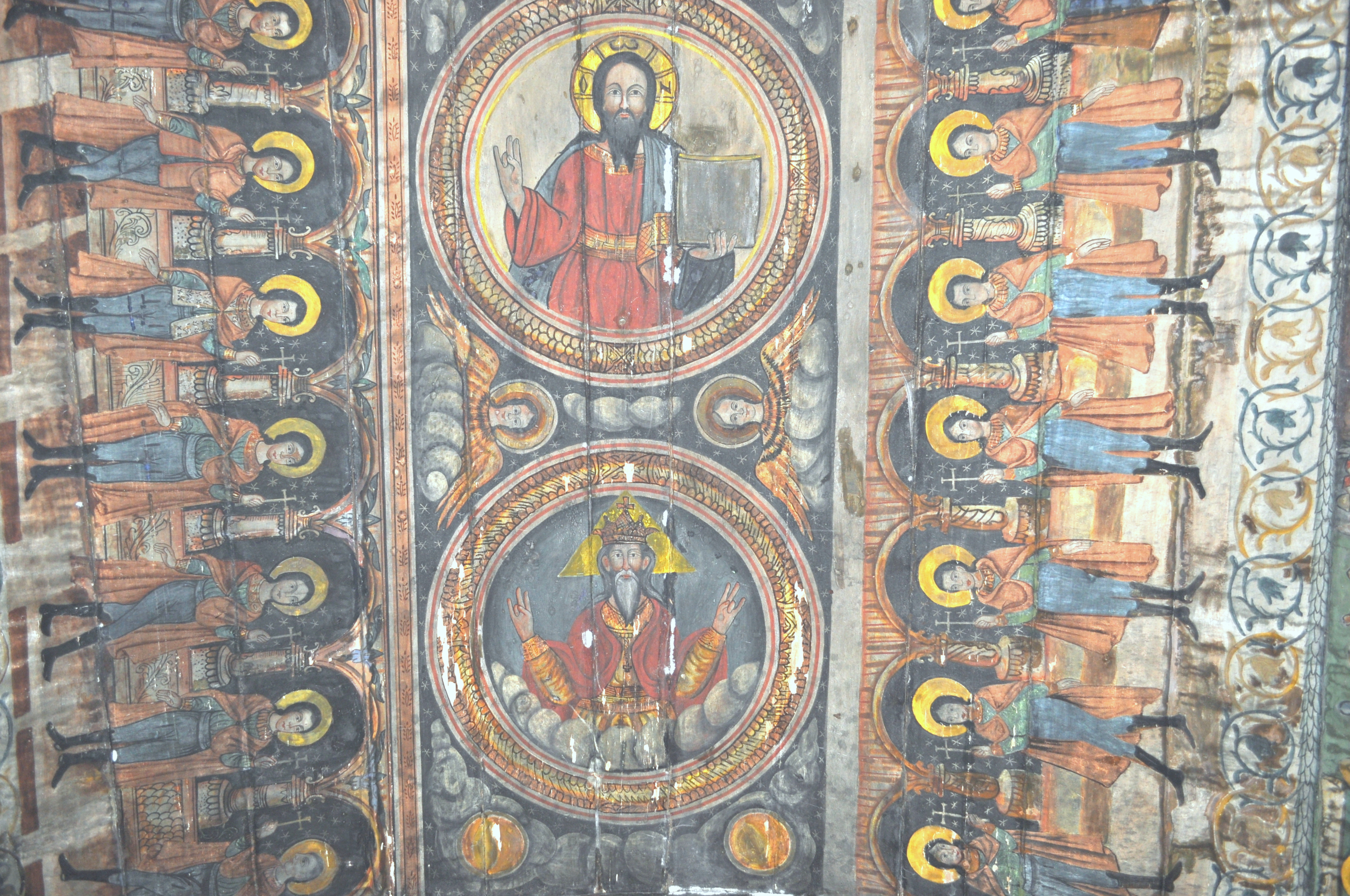 Biserica de lemn din Ticu-colonie, județul Cluj